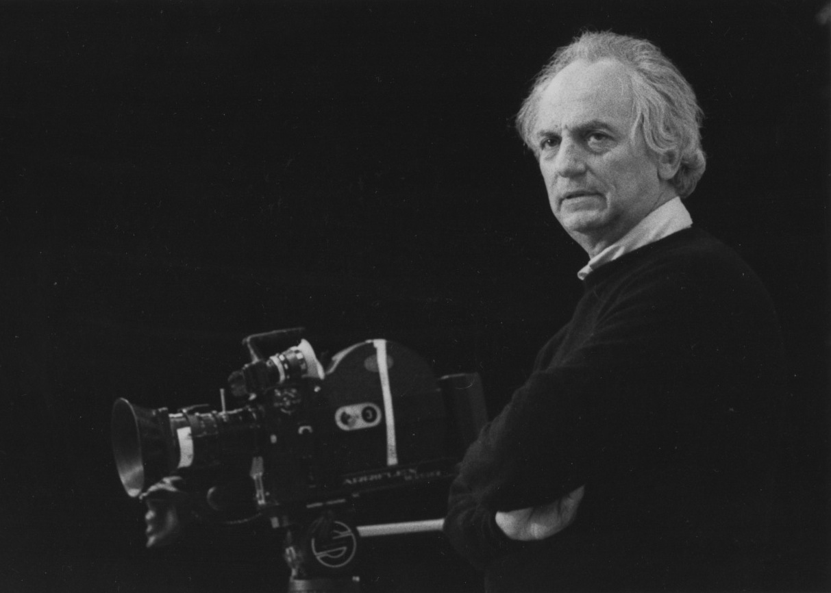 François Reichenbach est un cinéaste français né à Paris le 21 juillet 1921 et mort à Neuilly-sur-Seine le 2 février 1993.